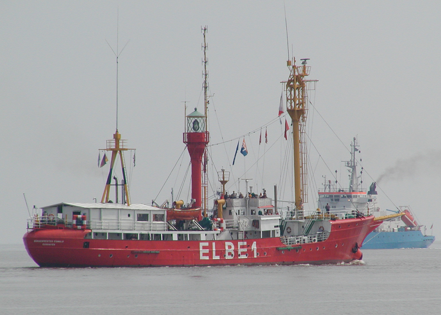 Das Museumsschiff Feuerschiff Elbe 1 auf Reisen